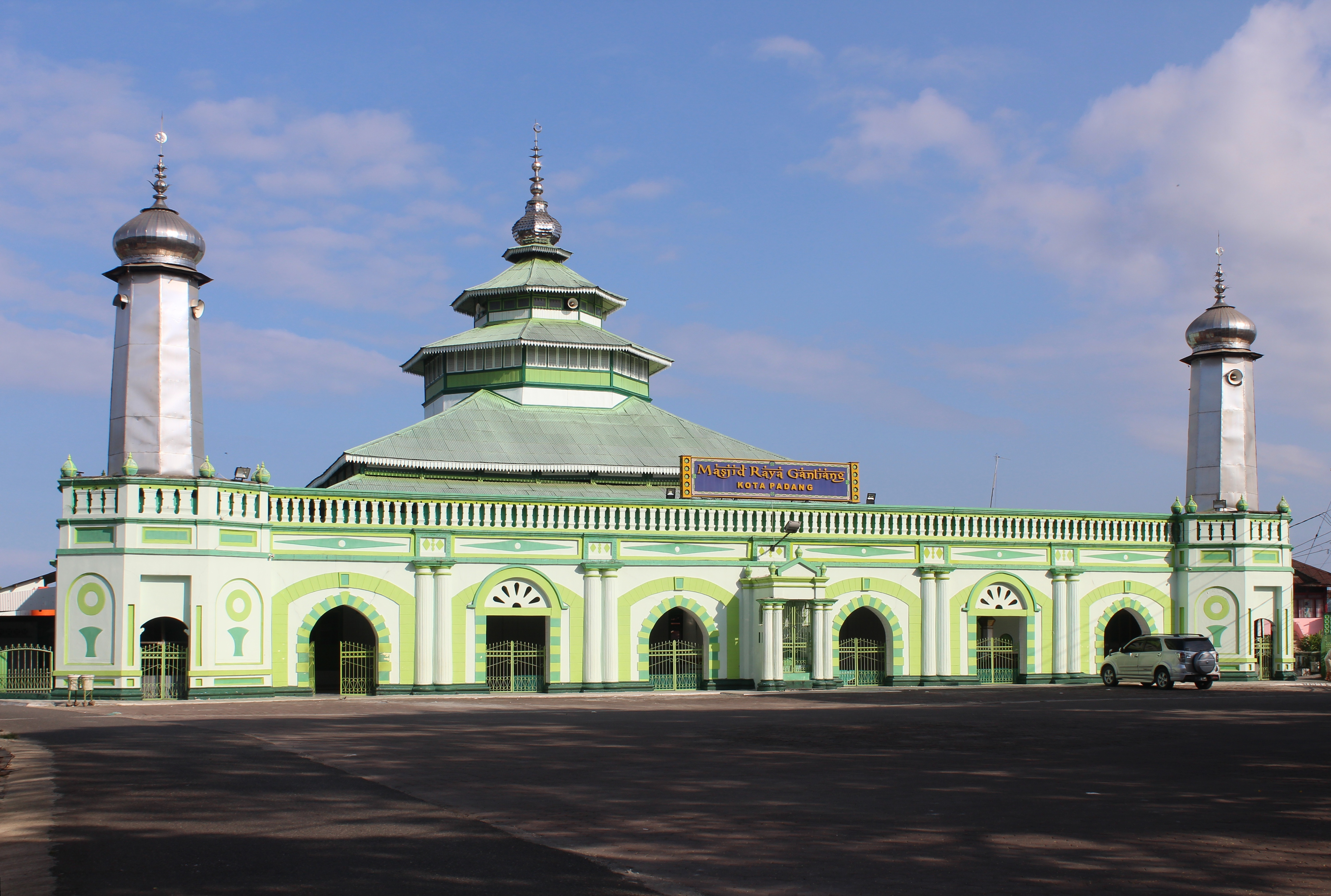 Masjid Raya Ganting di Kota Padang, Sumatra Barat, Indonesia